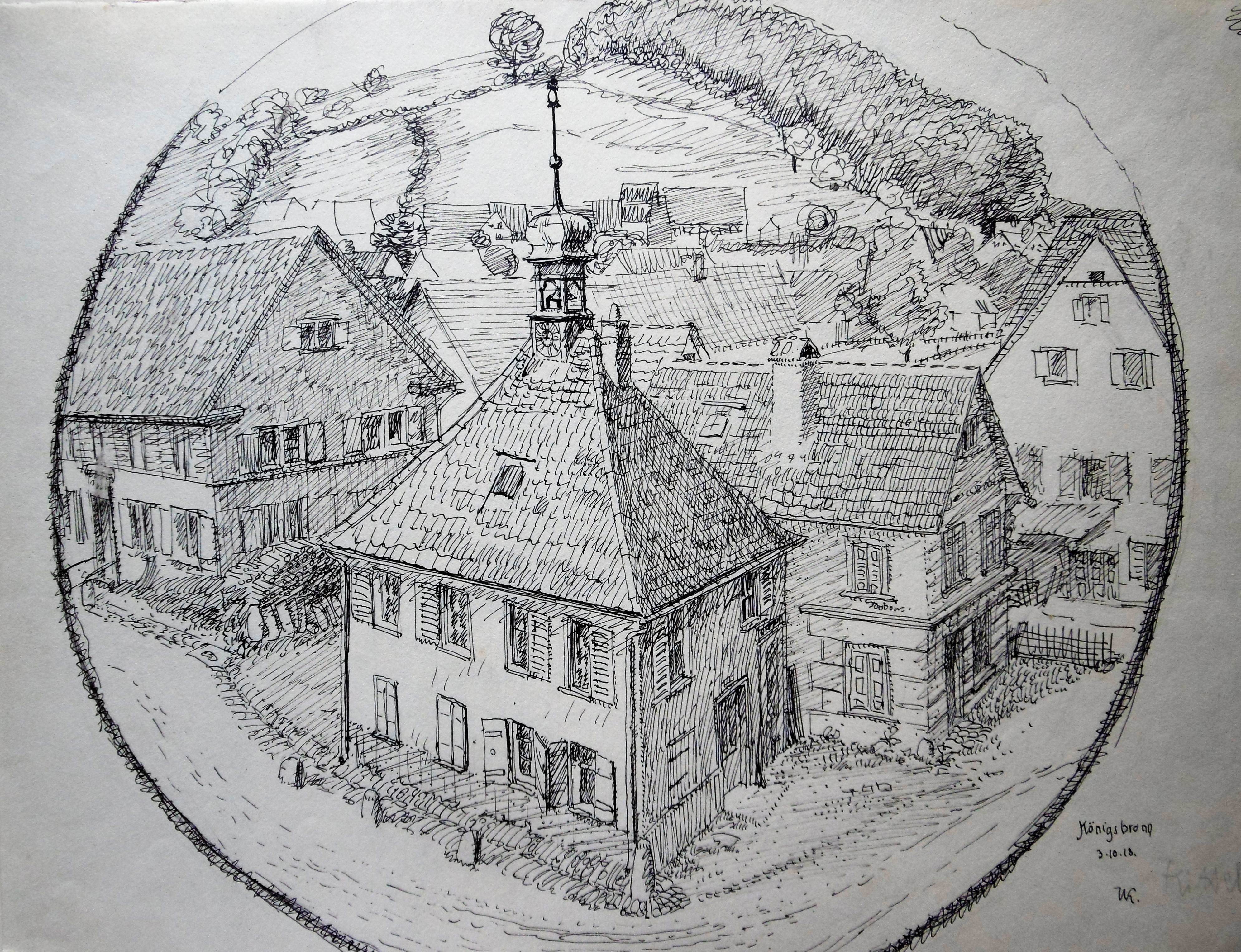 Königsbronn, in Darstellung von 1918, von Architekt Walter Kittel